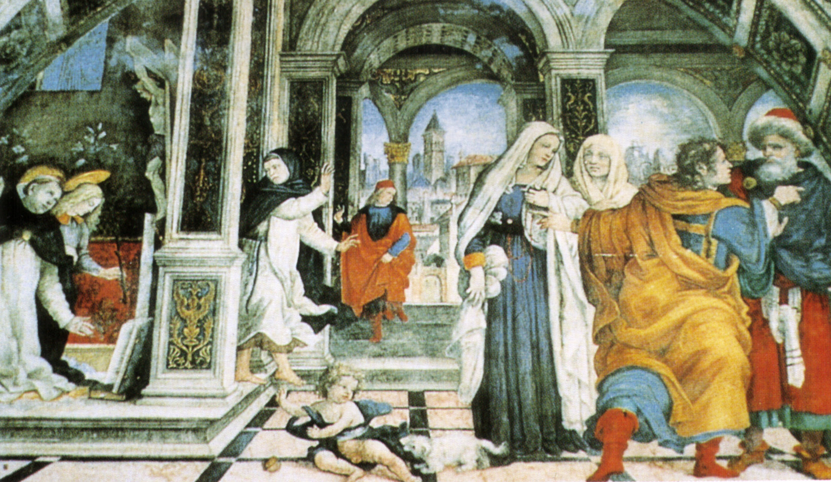 LIPPI, Filippino Assumption and Annunciation Fresco Santa Maria sopra Minerva, Rome